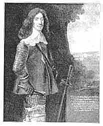 Claus von Ahlefeldt, (* 2. September 1614 in Gelting; † Januar 1674) war Feldmarschall und Befehlshaber aller dänischen Streitkräfte in Norwegen. Er war Erbherr der Herrschaft Bramstedt, Schierensee, Klein Nordsee und Ritter des Elefanten-Ordens und des Dannebrog-Ordens.